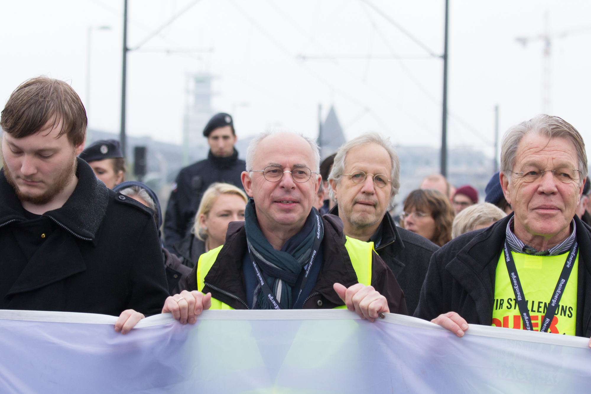 Köln gegen rechts, Demonstrationszug „Köln stellt sich quer“ etc. vom linksrheinischen Heumarkt über die Severinsbrücke ins rechtsrheinische Deutz